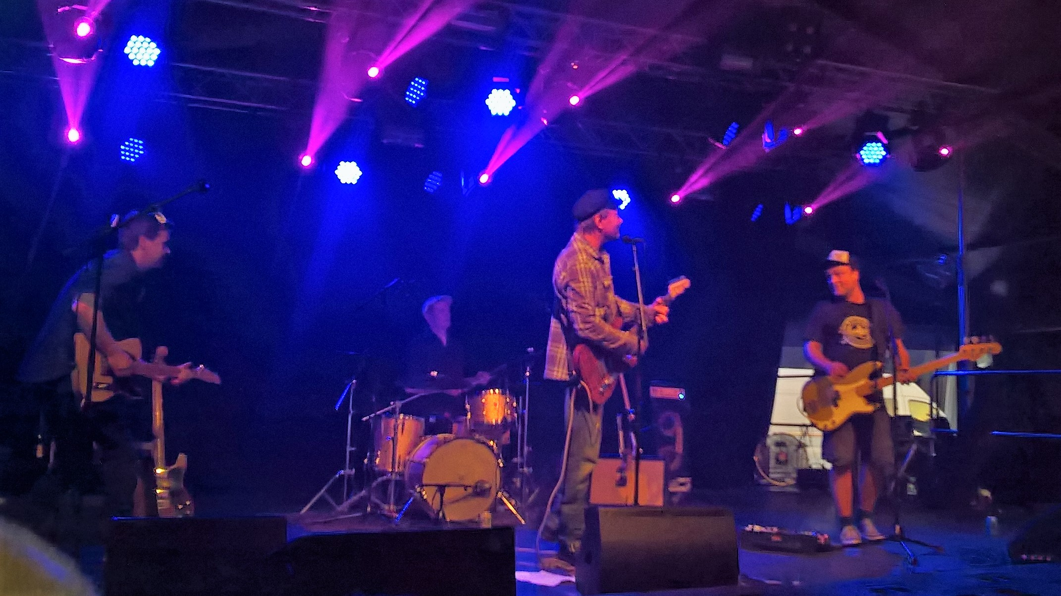 Pauli Hanhiniemen Retkue kesällä 2017